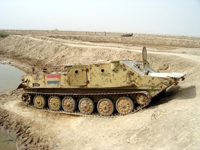 BTR-50PK Personnel CarrierIraqi BTR-50 Personnel Carrier